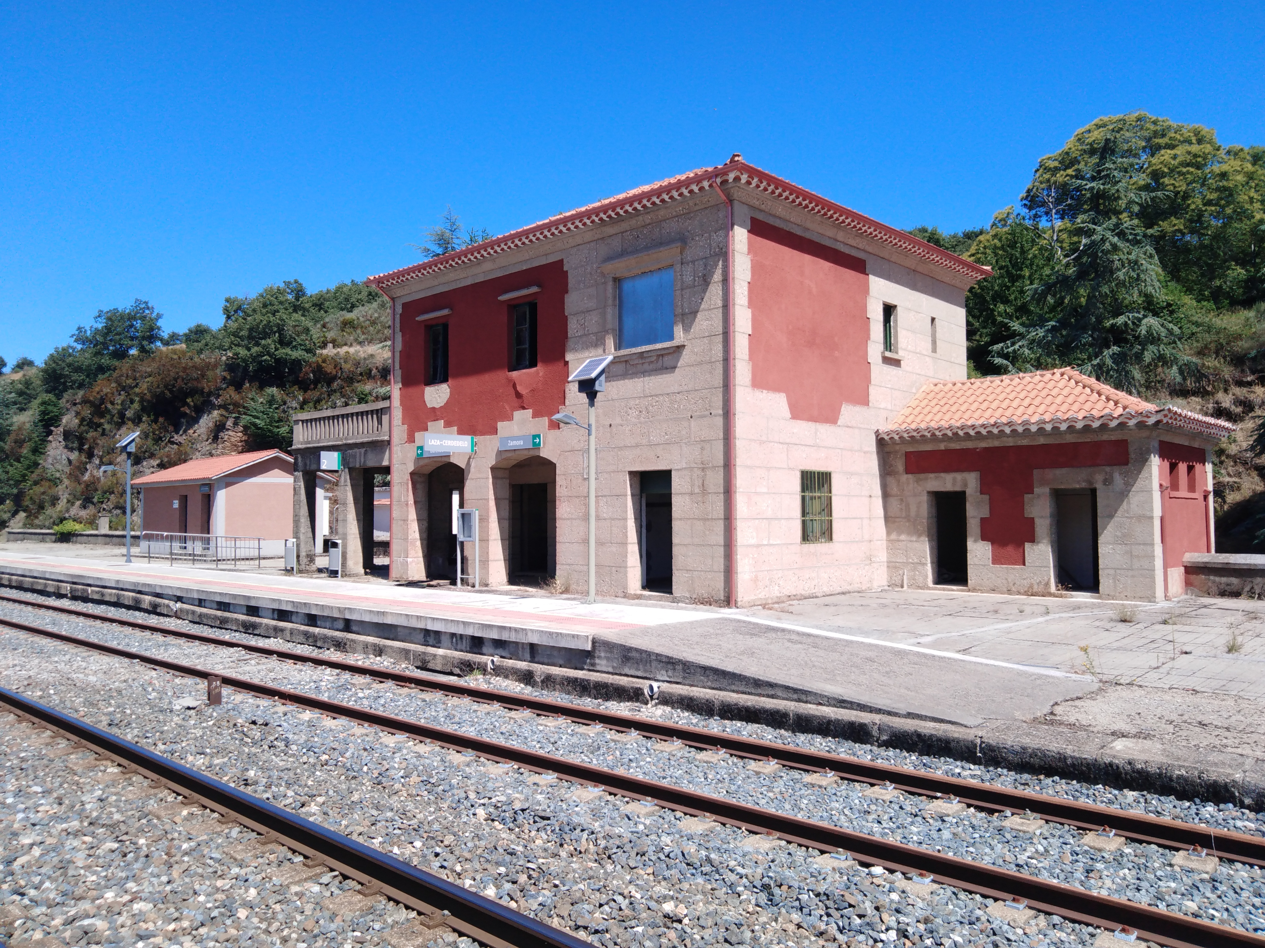 Estación de ferrocarril de Cerdedelo (Laza)